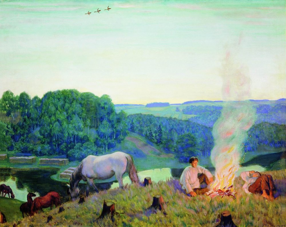 Б. Кустодиев. Костер. Ночное. 1916